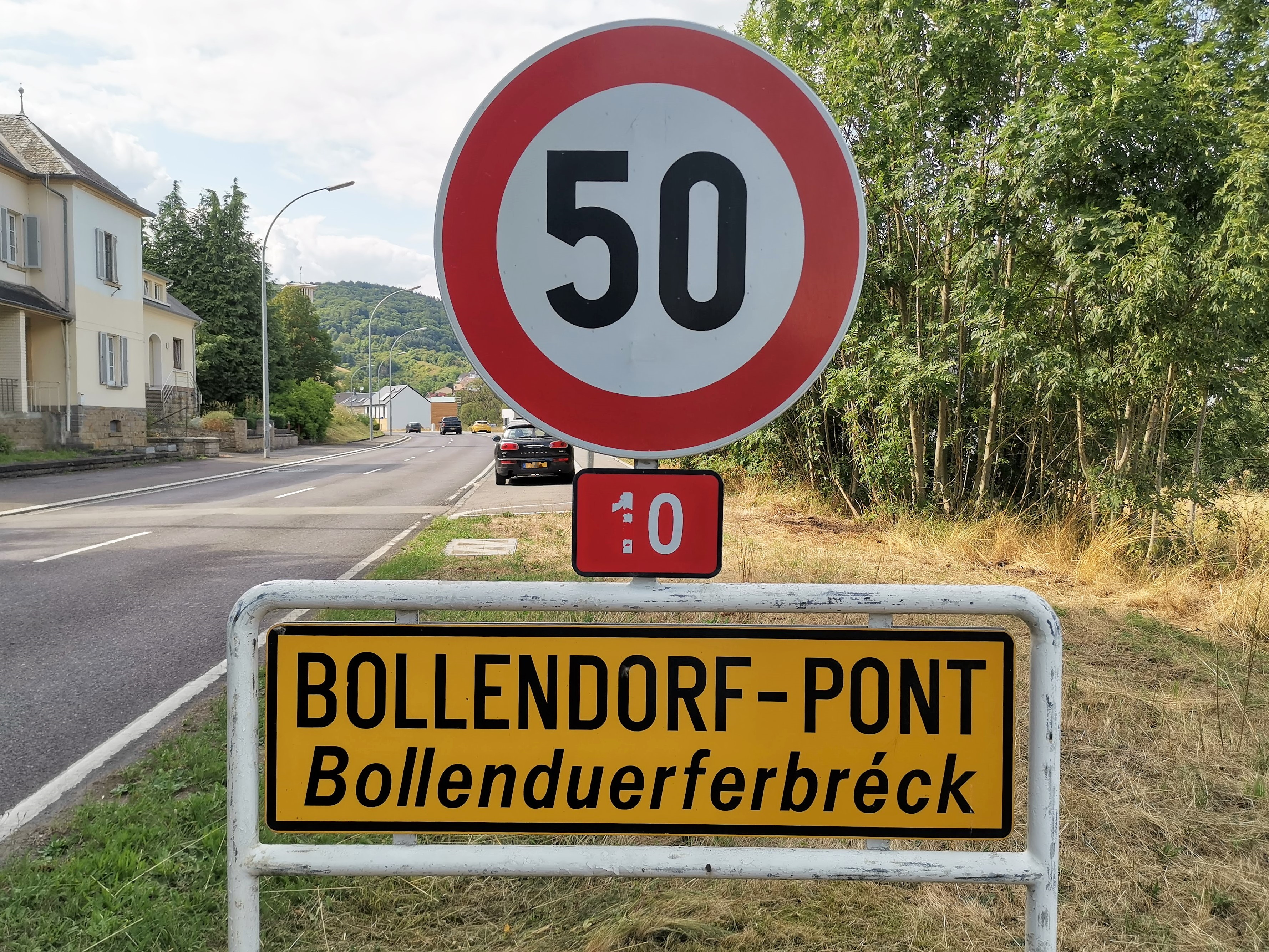 Bollendorf-Pont, commune de Berdorf. Panneau de localisation.